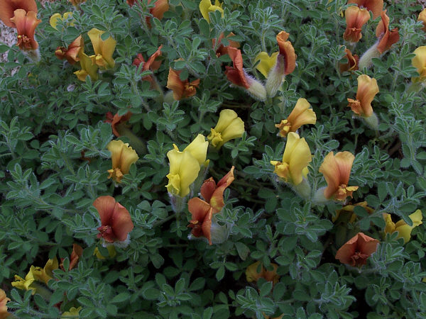 Cytisus hirsutus subsp. polytrichus. Plante vivace du sud de l'Europe, de 5 à 10 cm à port étalé, sur rochers et pierriers.